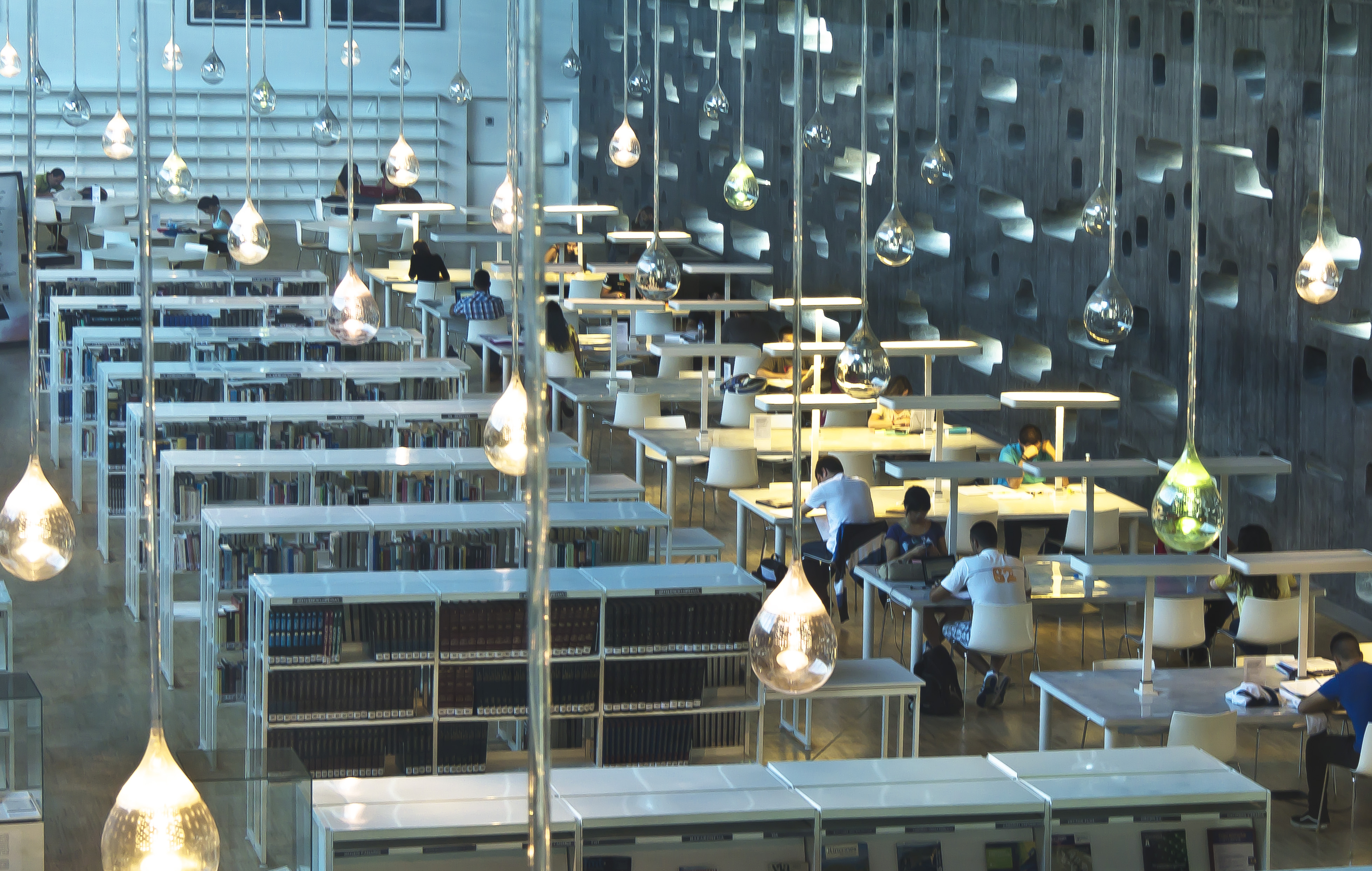 In der Stadtbücherei Santa Cruz de Tenerife im „Tenerife Espacio de Arte“ stehen dem Benutzer über 200 gut eingerichtete Arbeitsplätze zur Verfügung.